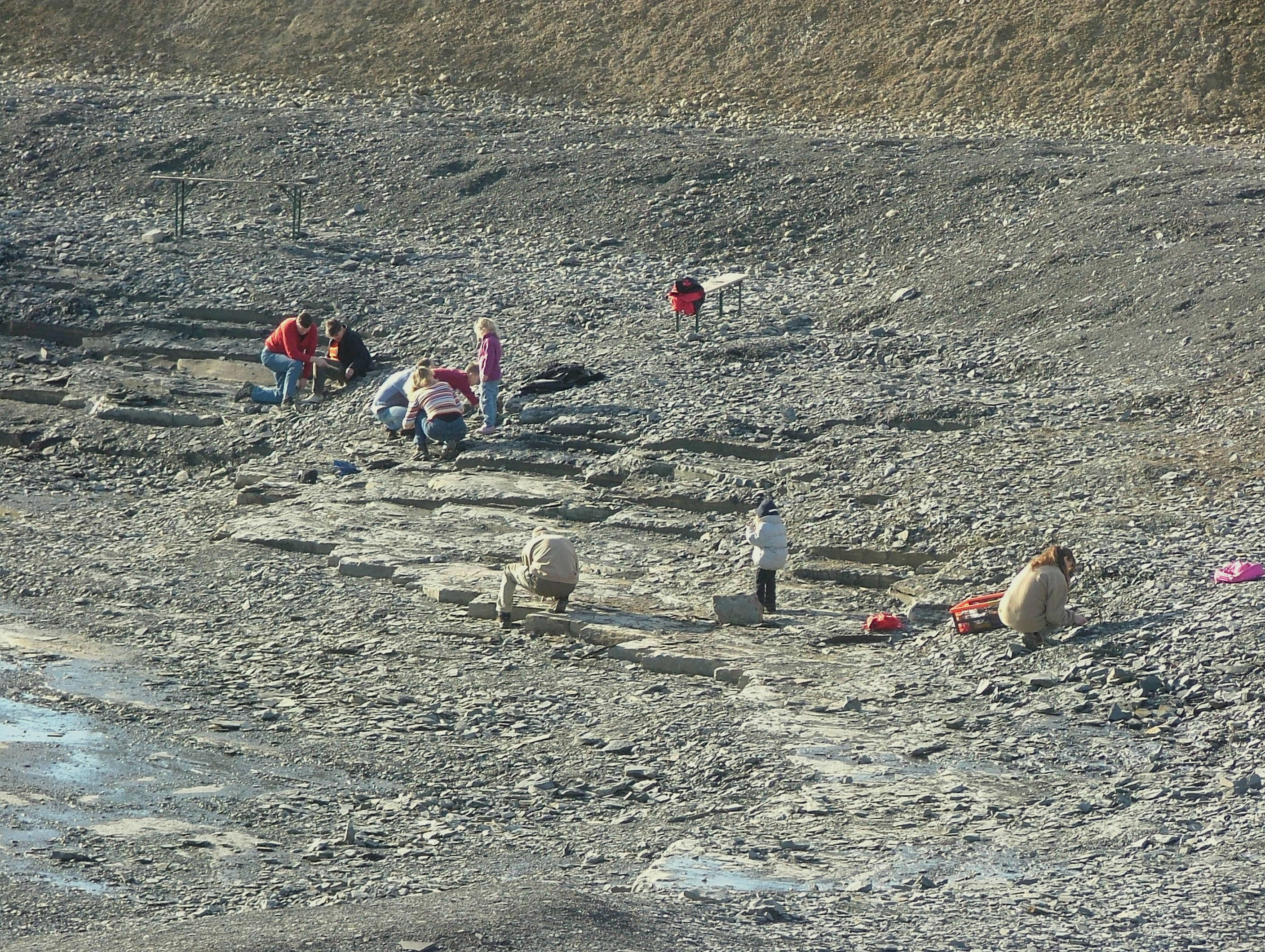 Holzmaden,auf der Suche nach Fosilien